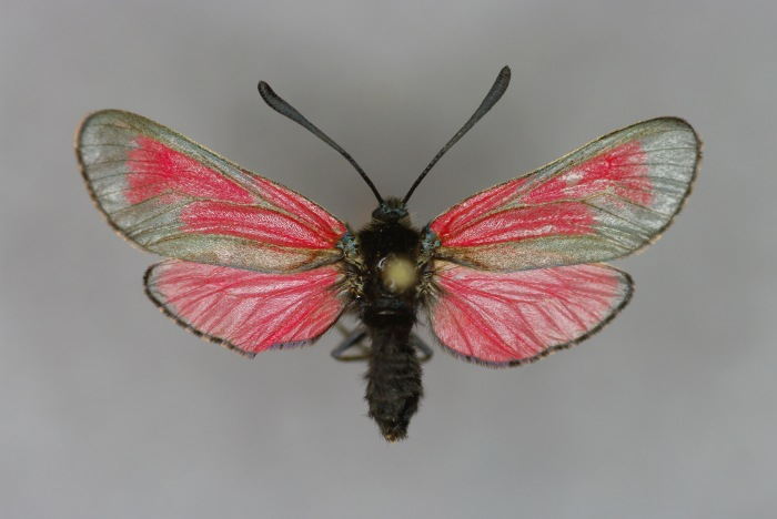 Zygaena (Mesembrynus) erythrus, Weibchen